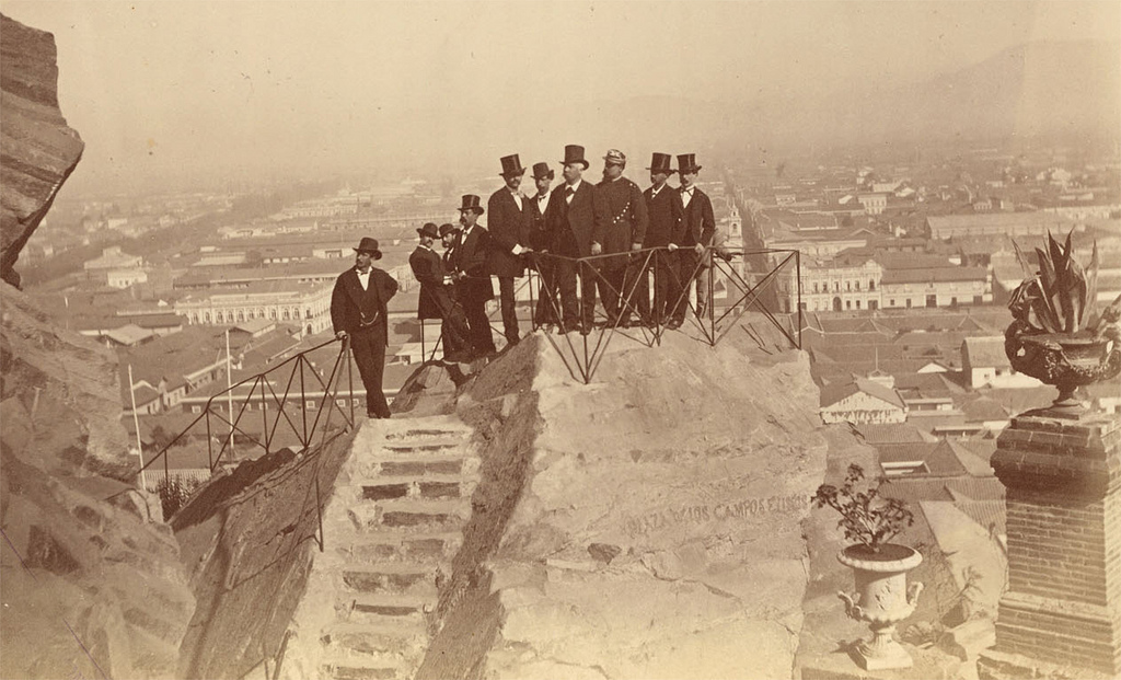 Álbum de Santa Lucía Colección de las principales vistas, monumentos, jardines, estatuas y obras de arte de este paseo, dedicado a la Municipalidad de Santiago